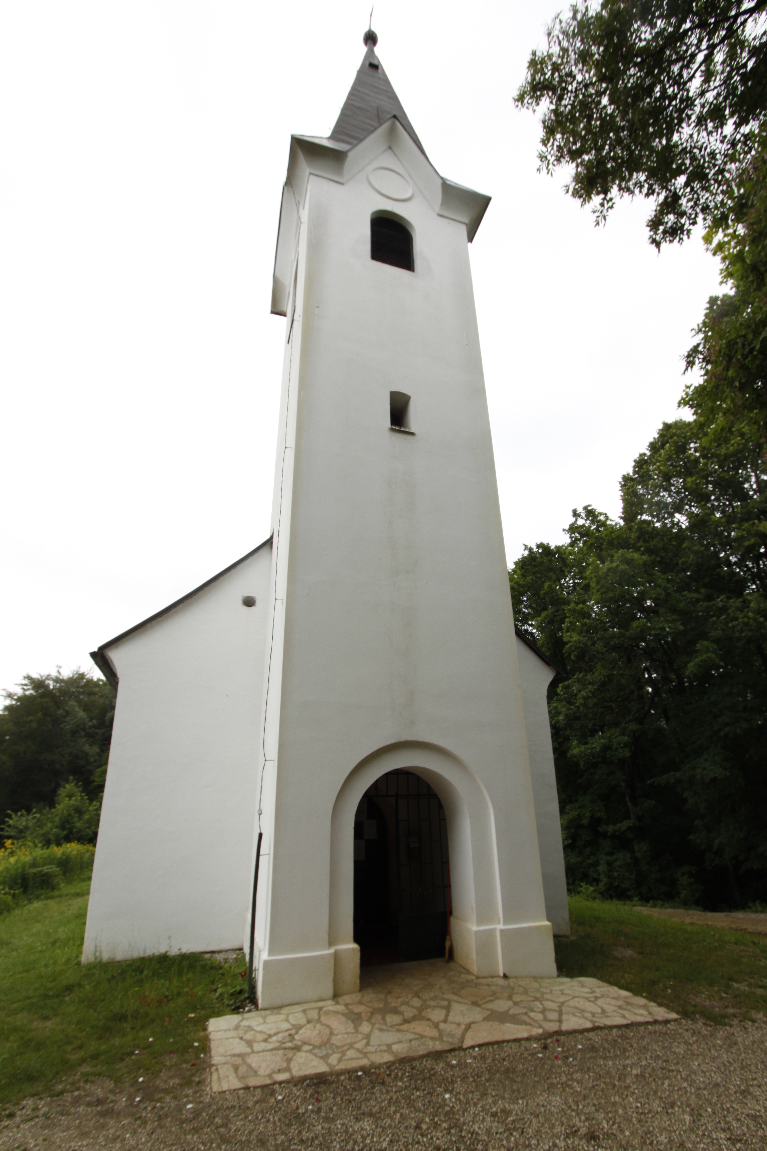 _MG_2727